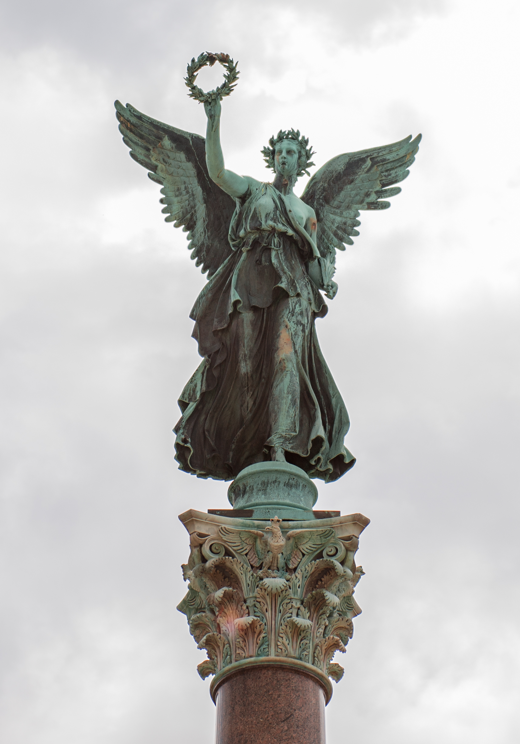 Die Victoria Christian Daniel Rauch auf dem Mehringplatz/Berlin